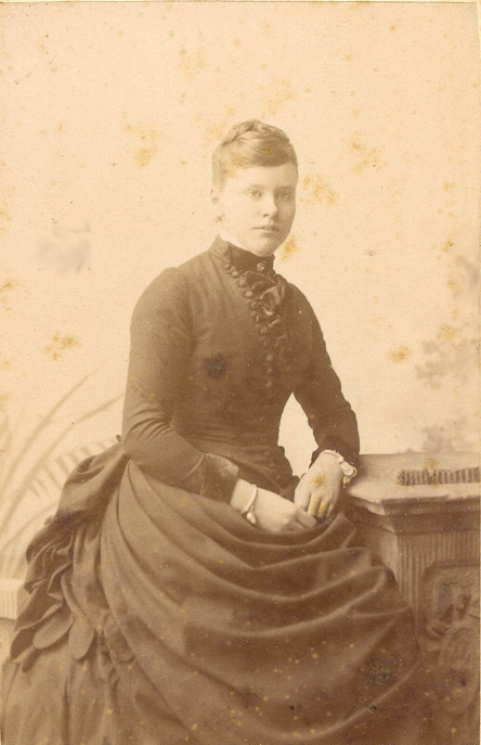 Image:Johanna_ter_Meulen, Amsterdam 1887